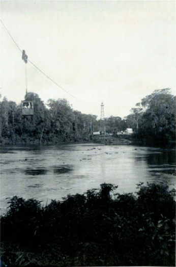 Lawabahn in Suriname